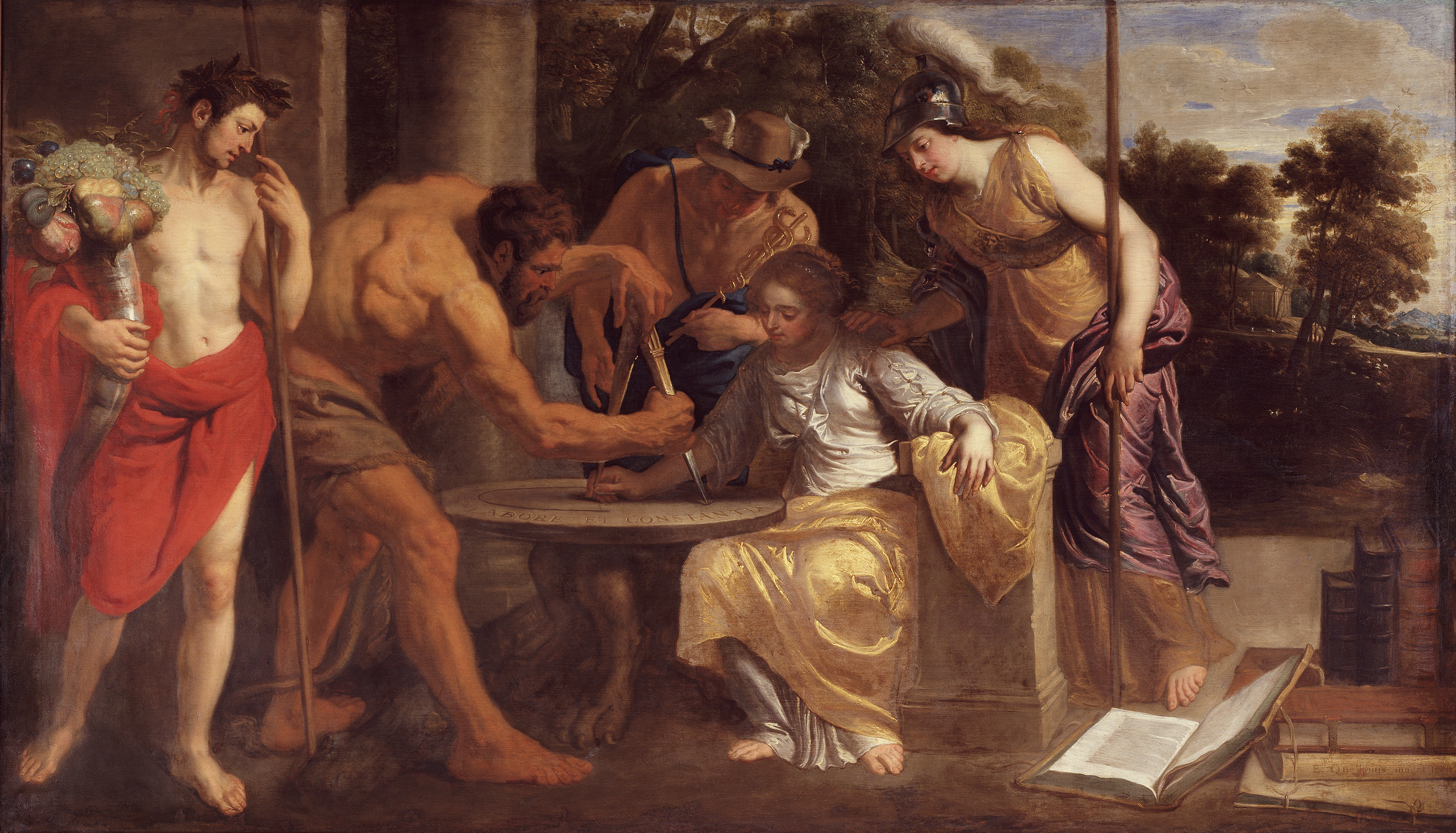 schilderij ( Erasmus II Quellinus ( Museum Plantin-Moretus